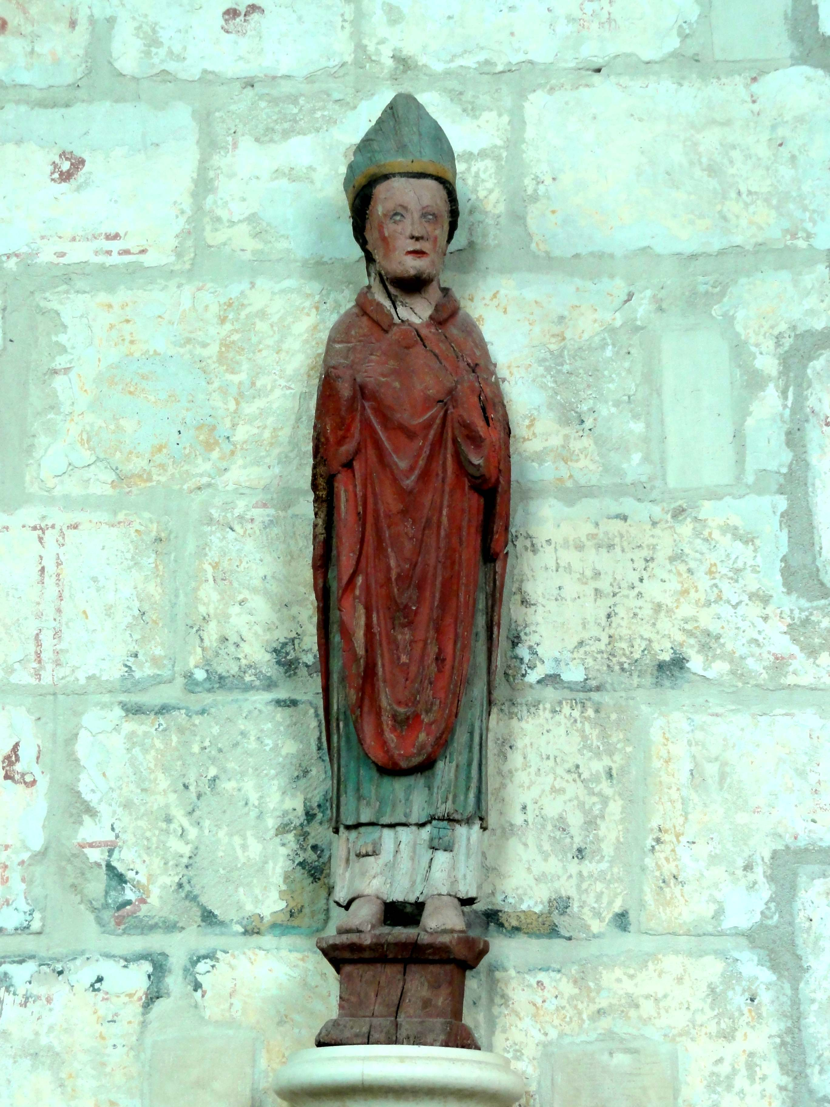 Mobilier de l'église - voir titre.